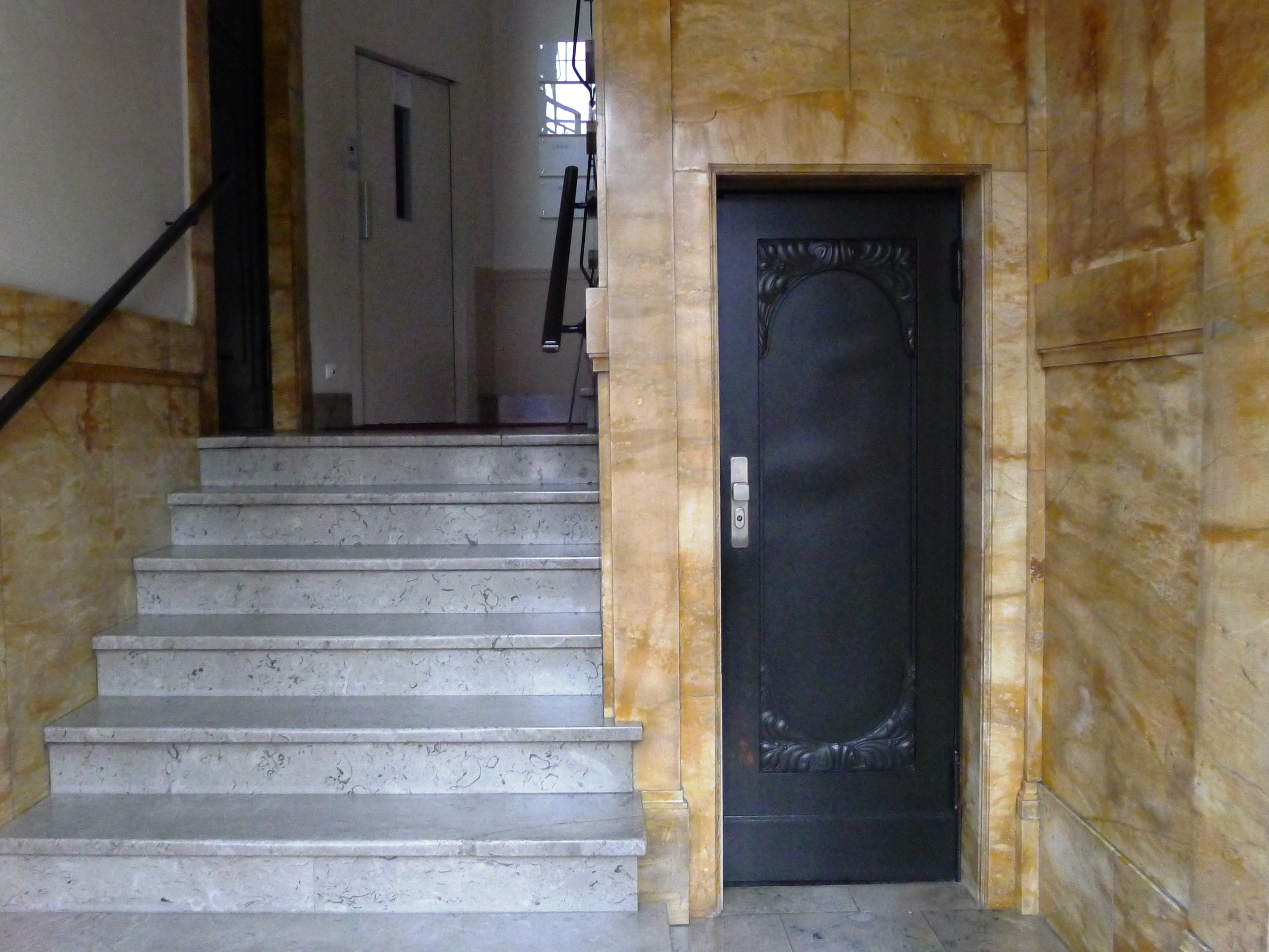 Treppenhaus eines Mietshauses